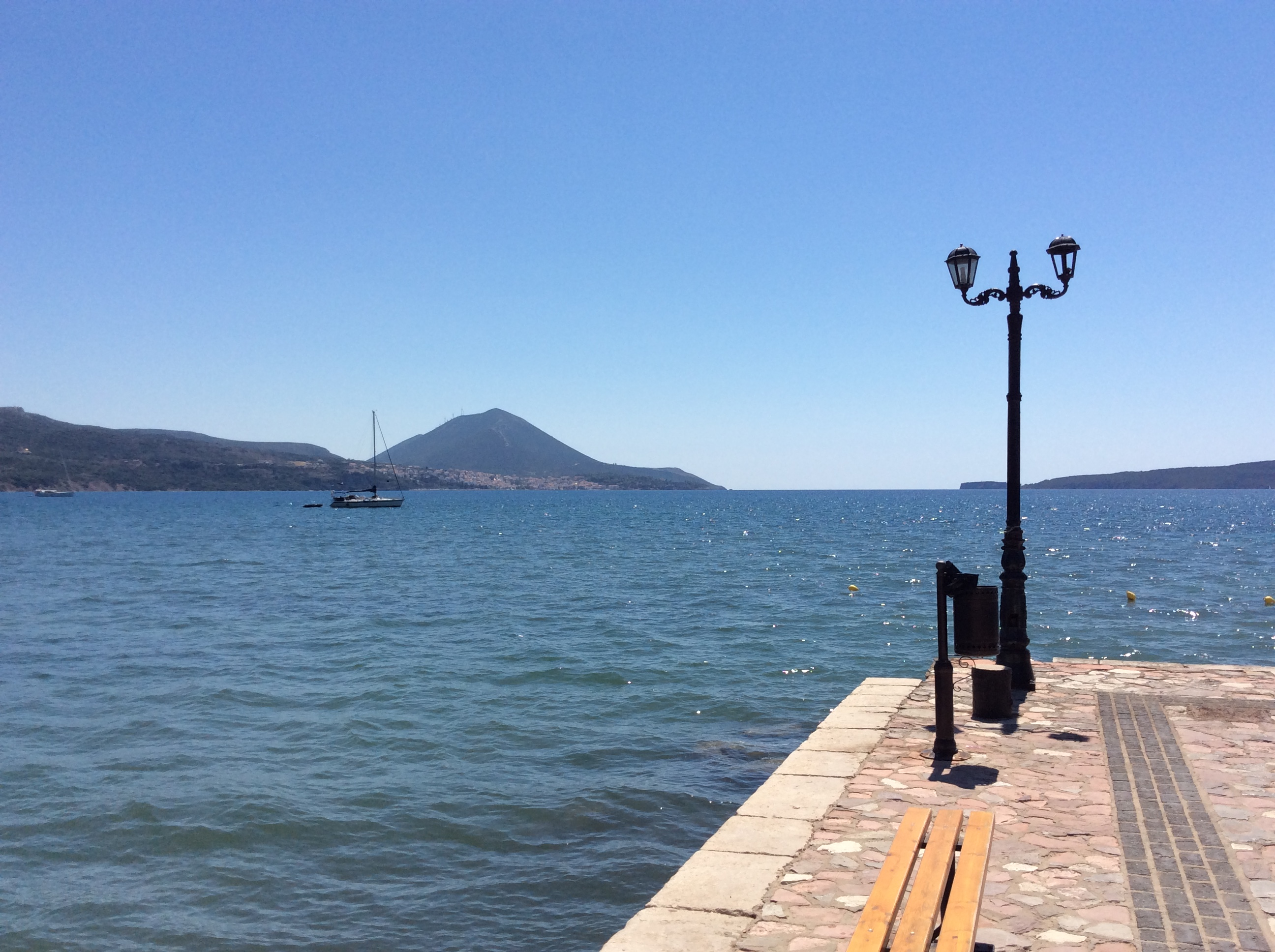 Γιάλοβα Μεσσηνίας. Άποψη της Πύλου από την προκυμαία της Γιάλοβας.